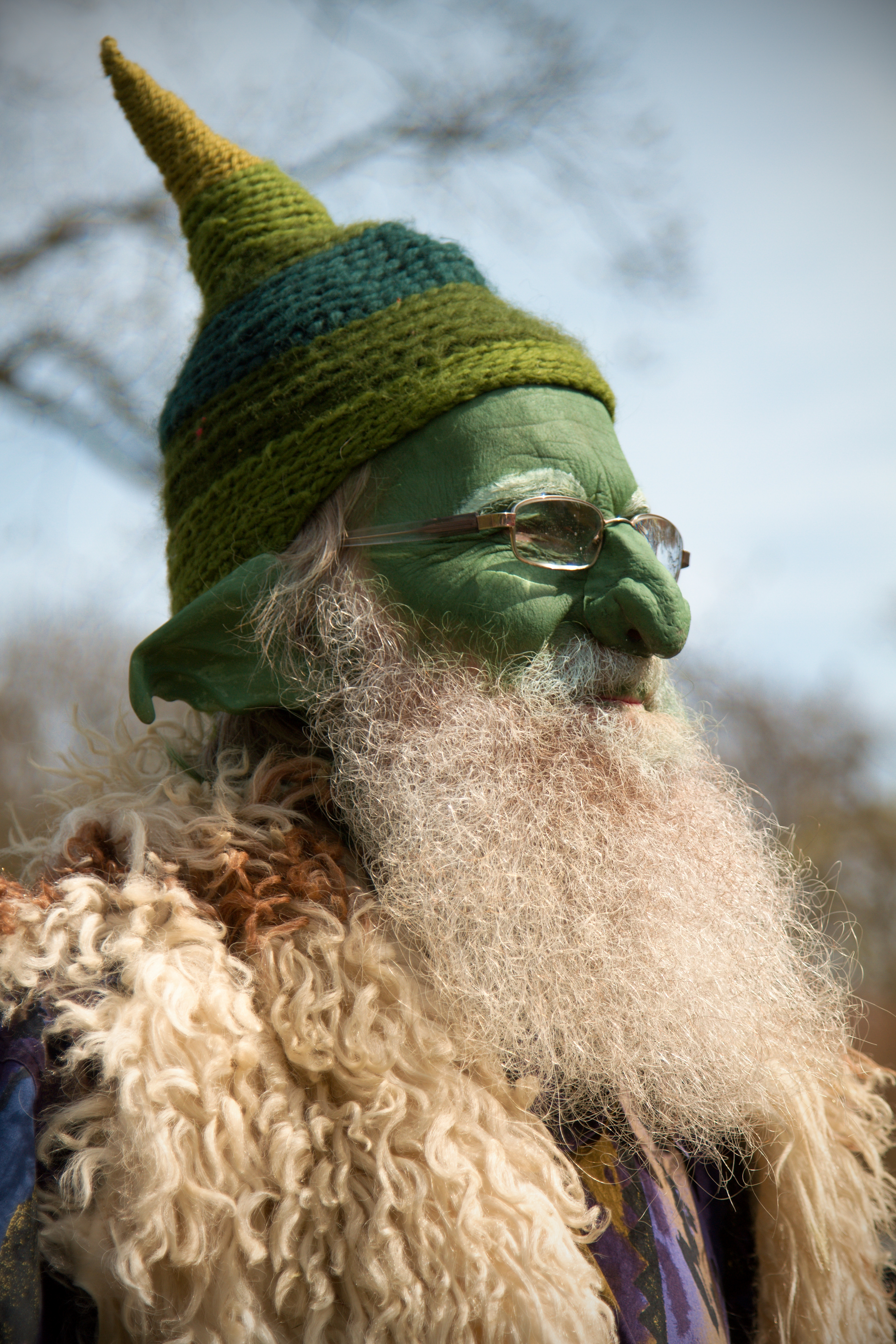 Grandpa